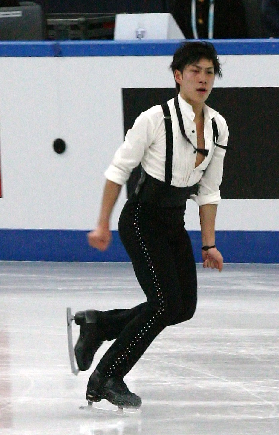 Кейджи Танака (Япония) на финале Гран-при среди юниоров 2012-2013. Короткая программа.